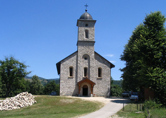 Црква Светог Илије у Крупи на Врбасу Licensing Категорија:Знаменитости Бањалуке